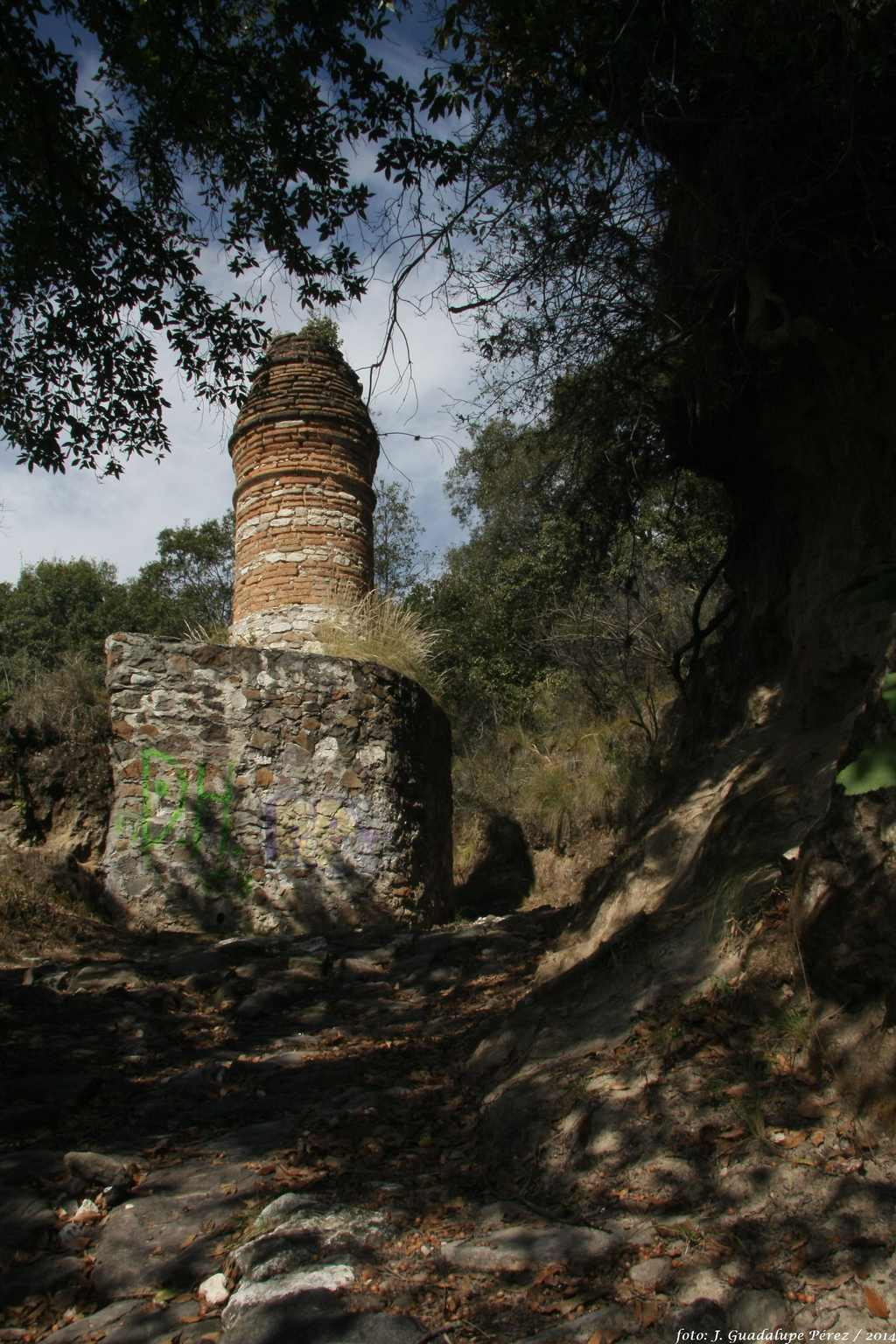 Totolac, Tlaxcala Foto: J. Guadalupe Pérez /2014